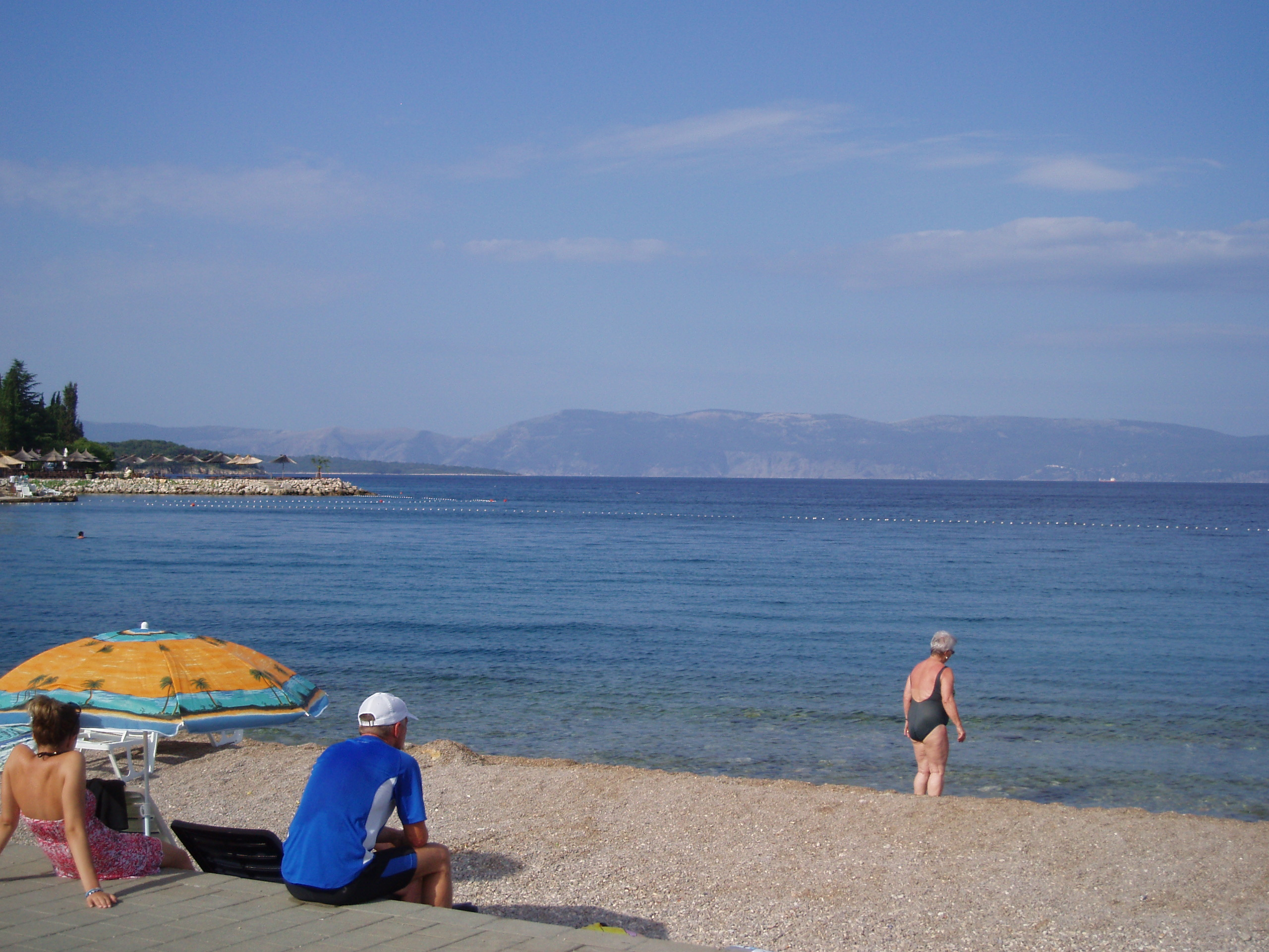 Hornatý ostrov Cres v pohledu z pláže v Njivice na ostrově Krk v Chorvatsku